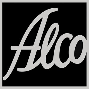 Logo der American Locomotive Company